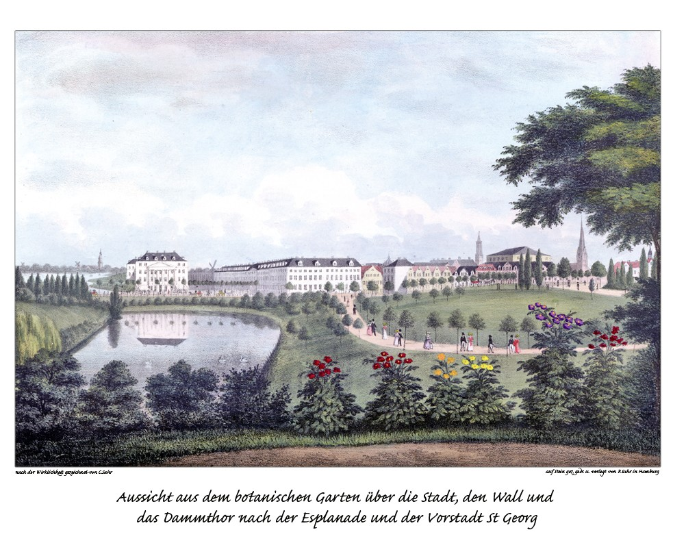 Aussicht aus dem botanischen Garten über die Stadt, den Wall und das Dammthor nach der Esplanade und der Vorstadt St. Georg, gezeichnet von Christoffer Suhr, Litho von Peter Suhr